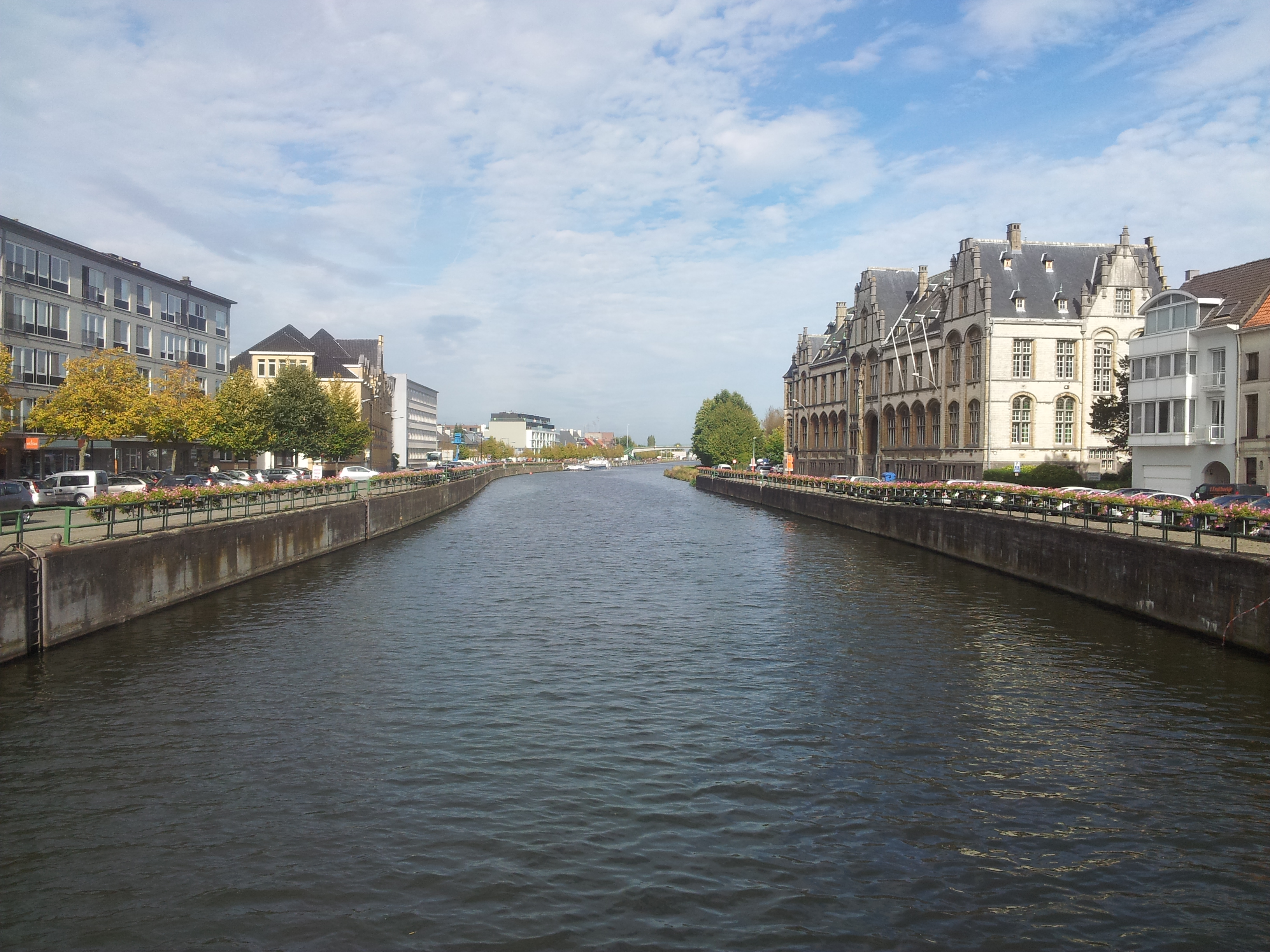 Oudenaarde & Schelde